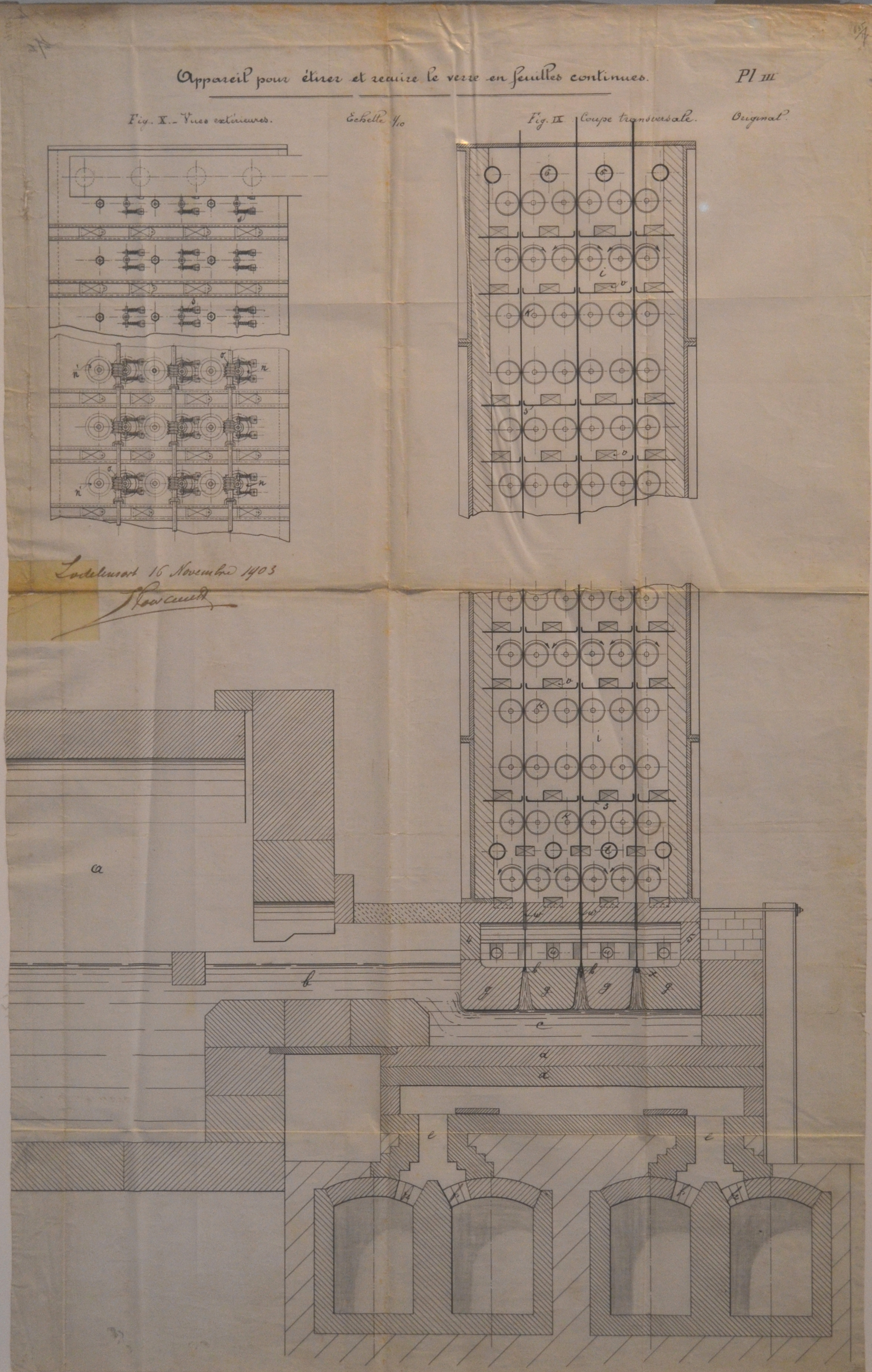 Émile Fourcault - Appareil pour étirer et recuire le verre en feuilles continues. Planches III signée à Lodelinsart le 16 novembre 1903. Archives générales du Royaume II, Dépôt Joseph Cuvelier, Archives du Service public fédéral Économie, Brevets, n° 173.821.